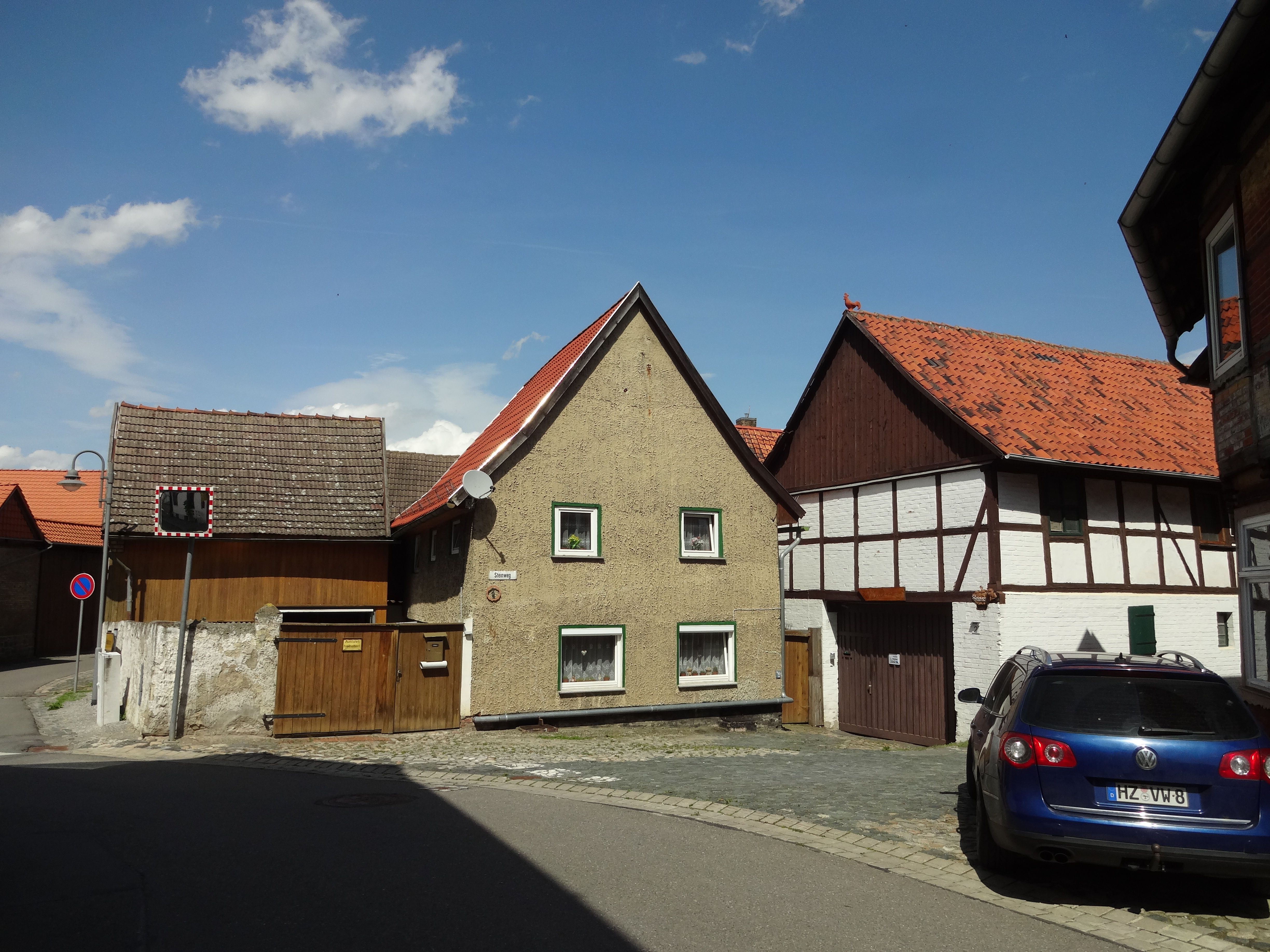 denkmalgeschützte Häusergruppe im Steinweg 1 und 2 in Börnecke, Ortsteil von Blankenburg/Harz